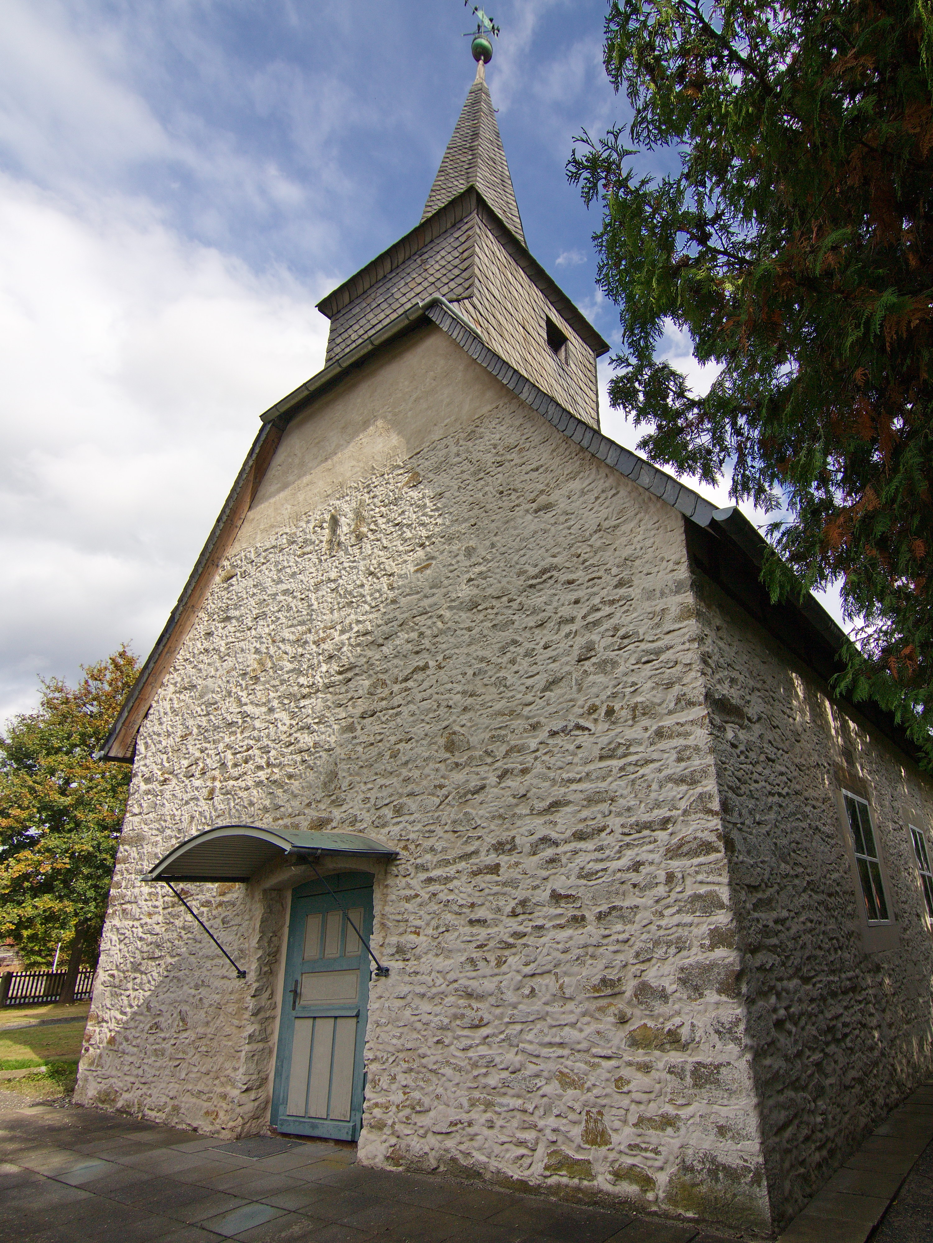 Eine der beiden Glocken im Turm der heutigen Kirche wurde im Jahre 1502 gegossen. Über einem Fenster des Kirchengebäudes befindet die: "IOST CUERDES ANNO 1614". Ob in diesem Jahr die Kirche neu erbaut oder lediglich renoviert wurde, ist nicht bekannt.